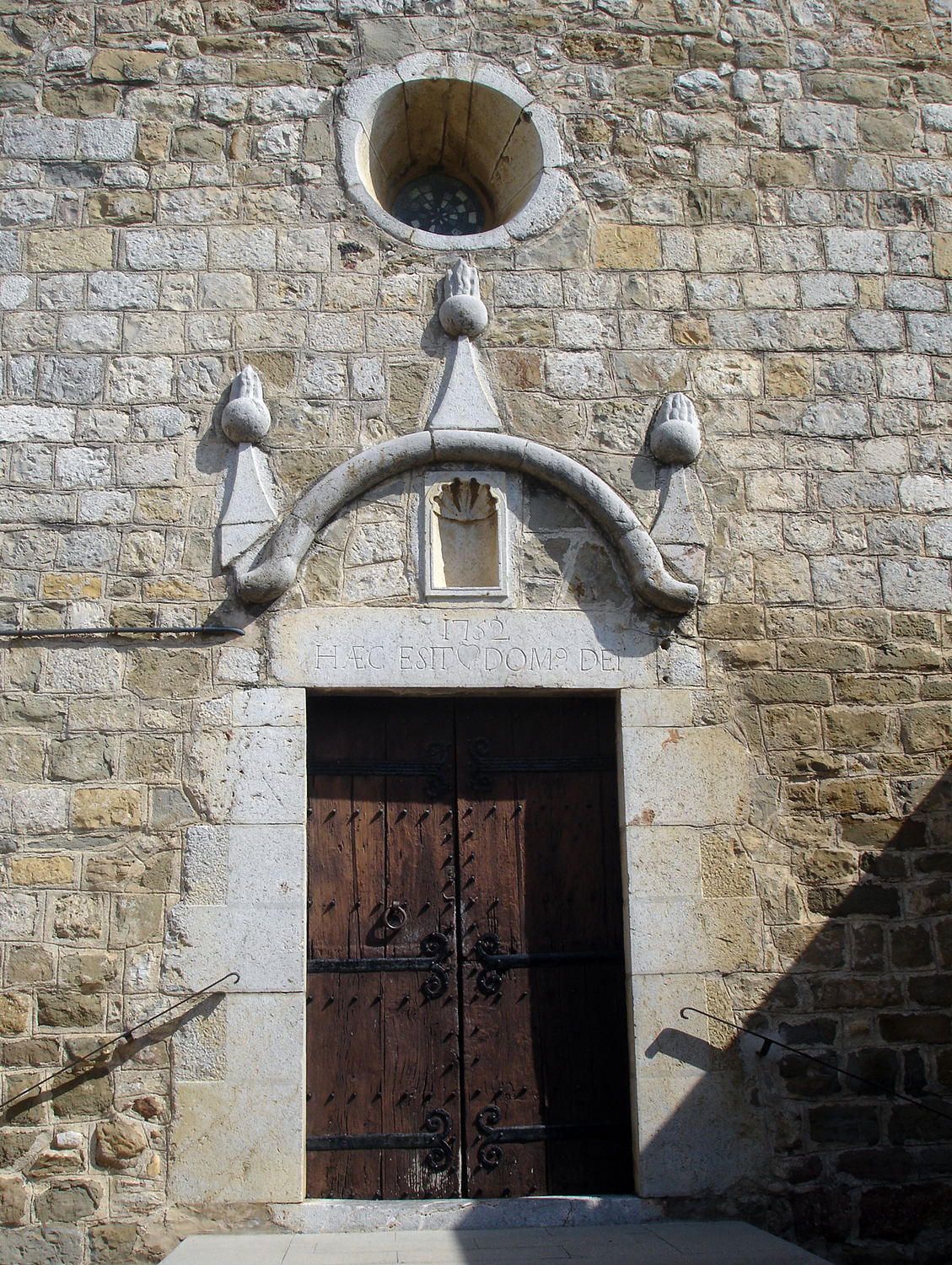 Esglèsia de Sant Climent de Tor (Girona, Catalunya, Espanya)